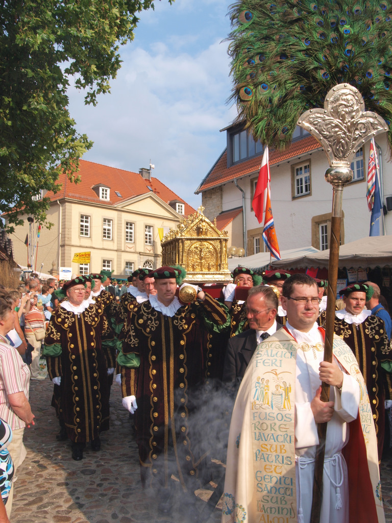 Rückführung der Reliquien des Hl. Liborius